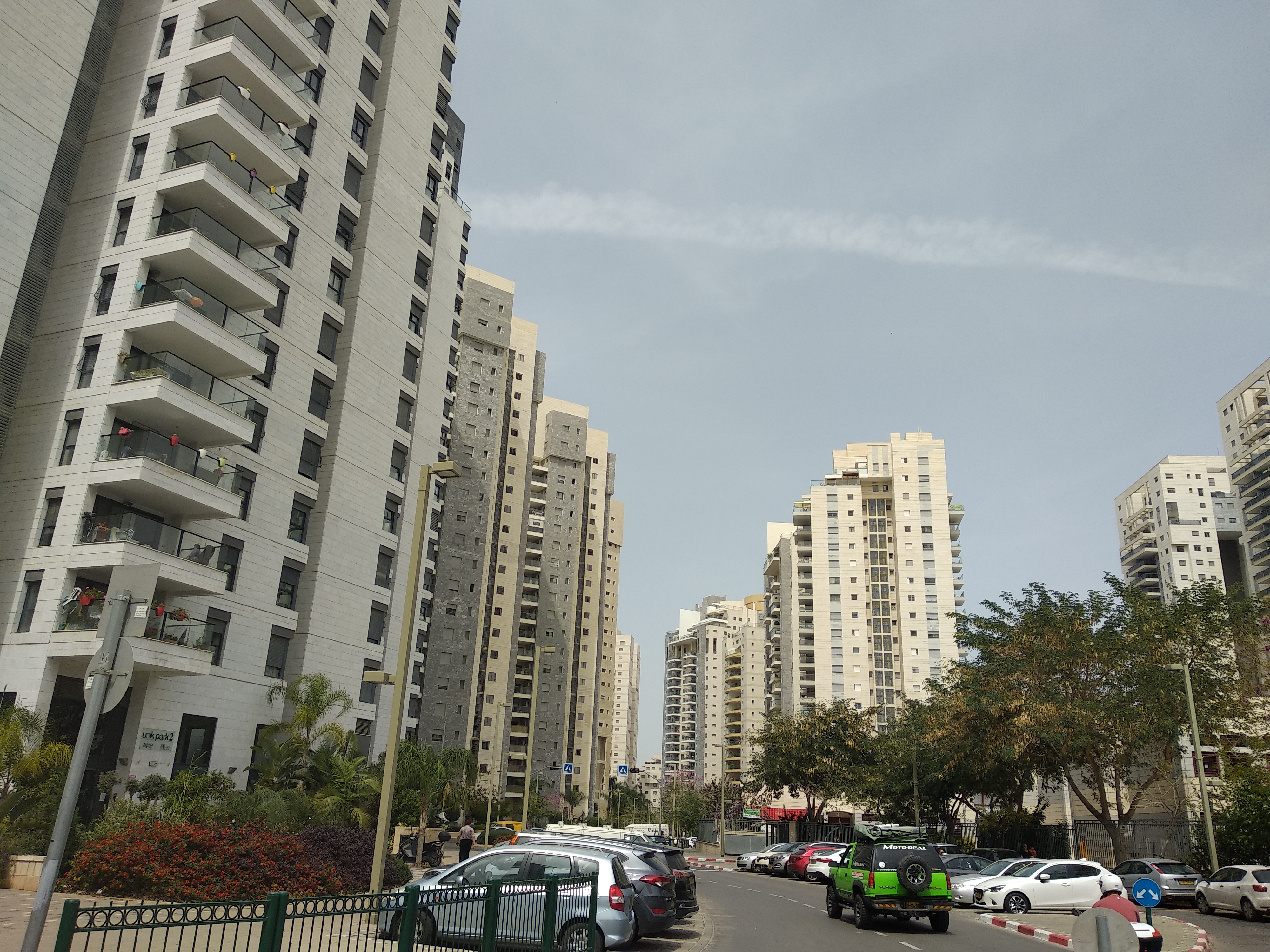 רחוב יעל רום בשכונת אם המושבות, פתח תקווה